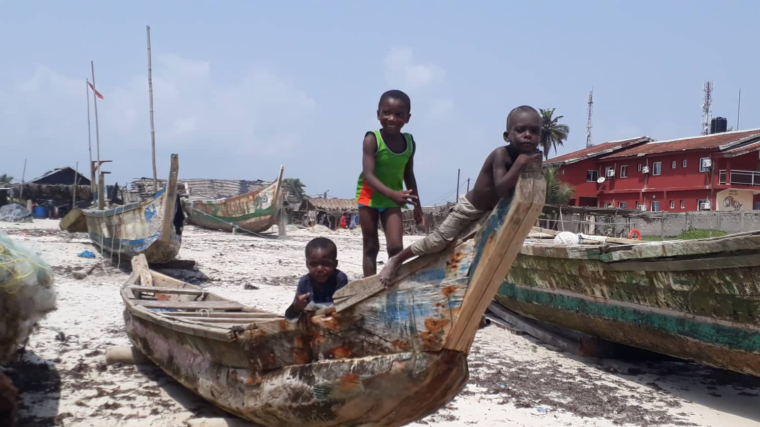 Les enfants veulent s'amuser et jouer dans un bateu sans aucune preocupation This is an image with the theme "Play" from: Ivory Coast